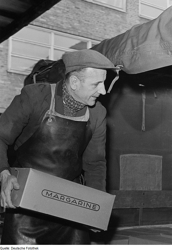 Original image description from the Deutsche FotothekPorträt des Arbeiters Willy Kalb